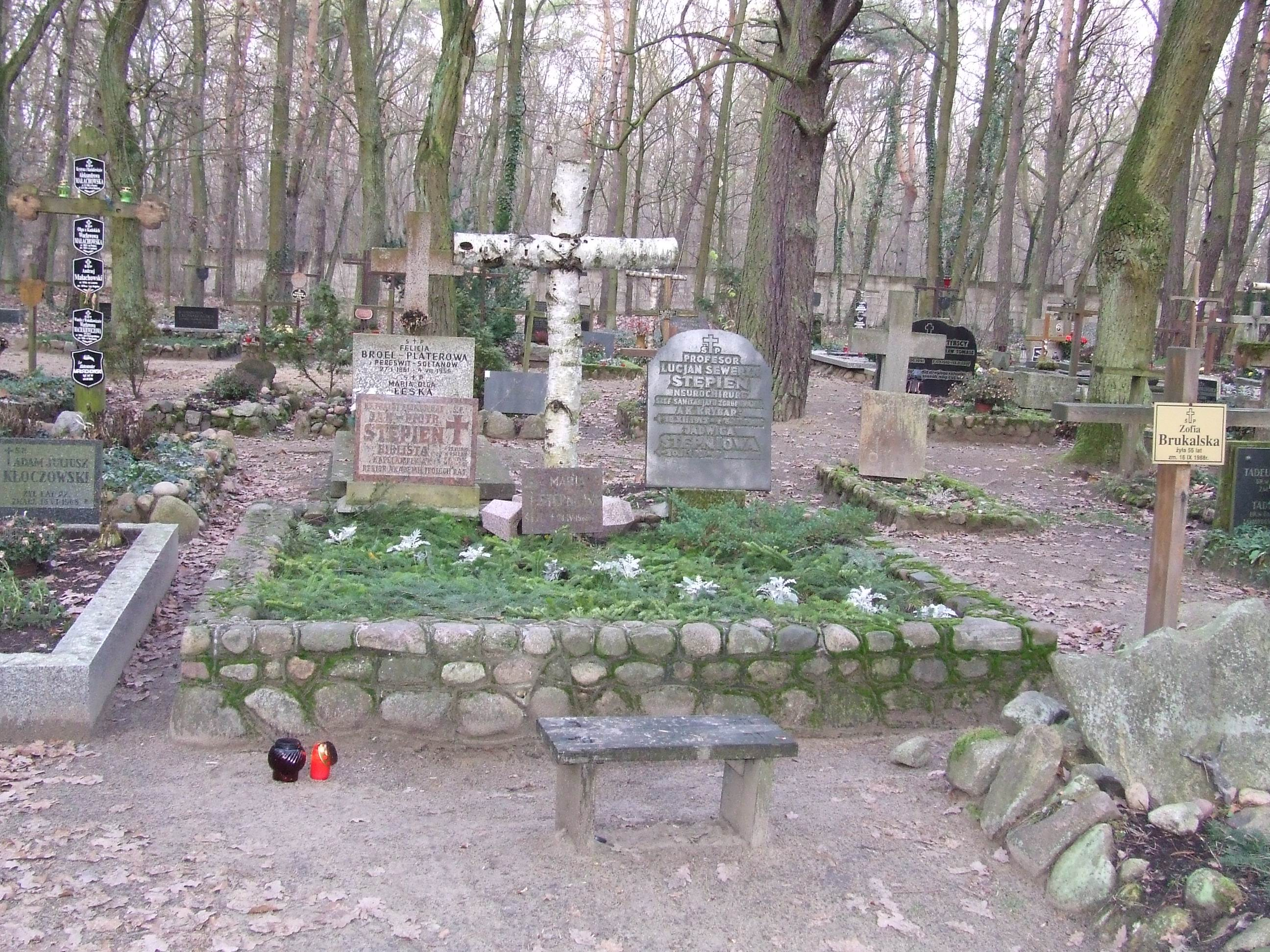 Groby Małachowskich i Stępniów, cmentarz leśny, Laski